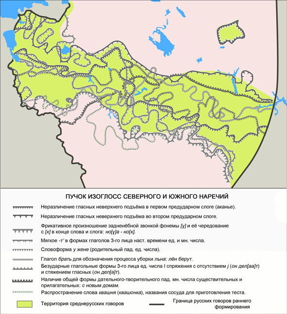 Карта пучка изоглосс северного и южного наречий русского языка на территории среднерусских говоров. На основе: Захарова К. Ф., Орлова В. Г. Диалектное членение русского языка. — 2-е изд. — М.: Едиториал УРСС, 2004. — С. 72 Бромлей С. В., Булатова Л. Н., Захарова К. Ф. и др. Русская диалектология / Под ред. Л. Л. Касаткина. — 2-е изд., перераб. — М.: Просвещение, 1989. — С. 201